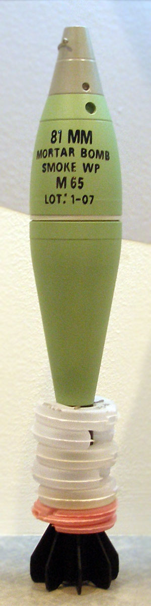 81mm mortar bomb Smoke WP M65